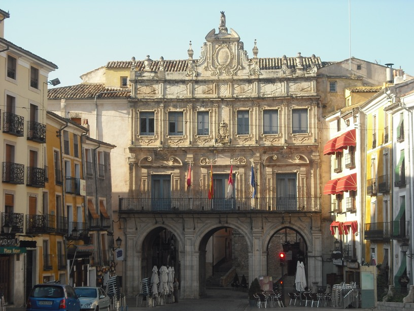 Ayuntamiento de Cuenca.